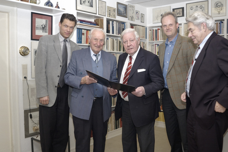 Übergabe der Urkunde zur Ehrenmitgliedschaft von Helmut Schmidt (SPD) im Reichsbanner Schwarz-Rot-Gold, Bund aktiver Demokraten e.V. am 17.01.2006 in Hamburg. Auf dem Bild (v.l.n.r.): Björn Saalfeld, Hans Bonkas, Helmut Schmidt, Dirk Sielmann, Hans Saalfeld.